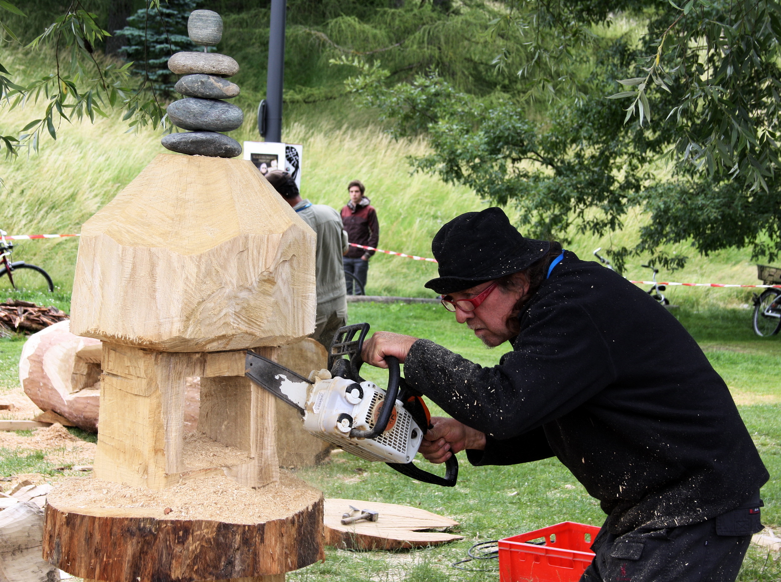 Sommertollwood 2011 - Ludwig Frank arbeitet an der Skulptur "große Welle"